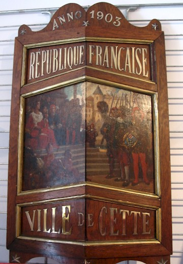 photo perso d'un bouclier ancien de joutes nautiques à Sète (Hérault).